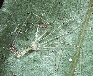 female Leptopholcus tanikawai from Okinawa.